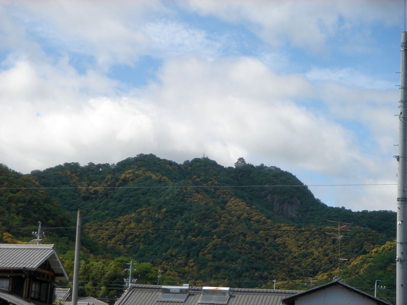 Mt_Kinka（金華山）,Gifu,Gifu,Japan(岐阜県岐阜市の岩戸公園の南付近 で撮影。